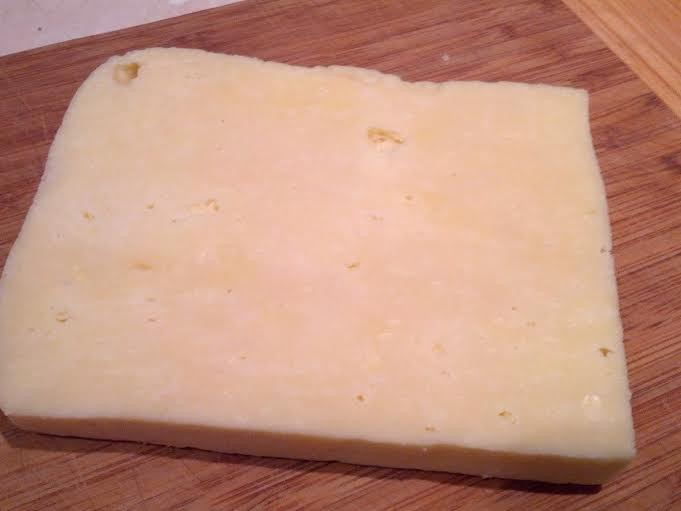 Srpski (latinica): Izgled piratskog kačkavalja